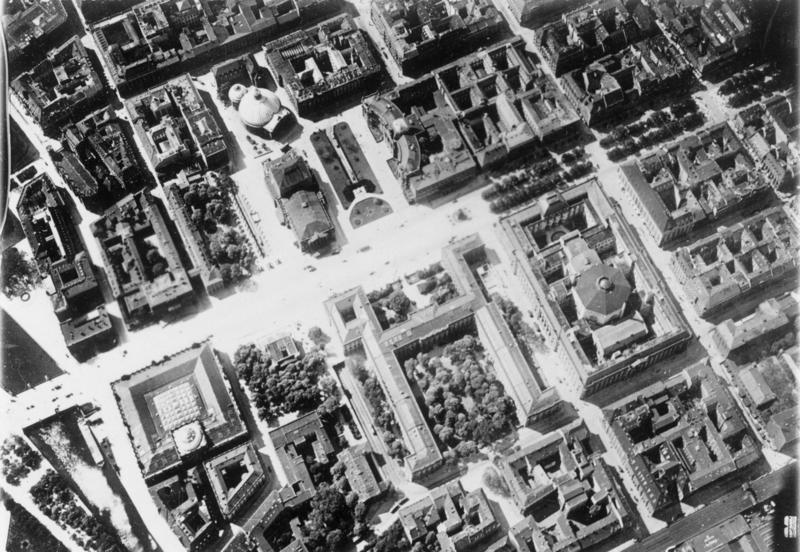 Kaiser Franz Josephs Platz